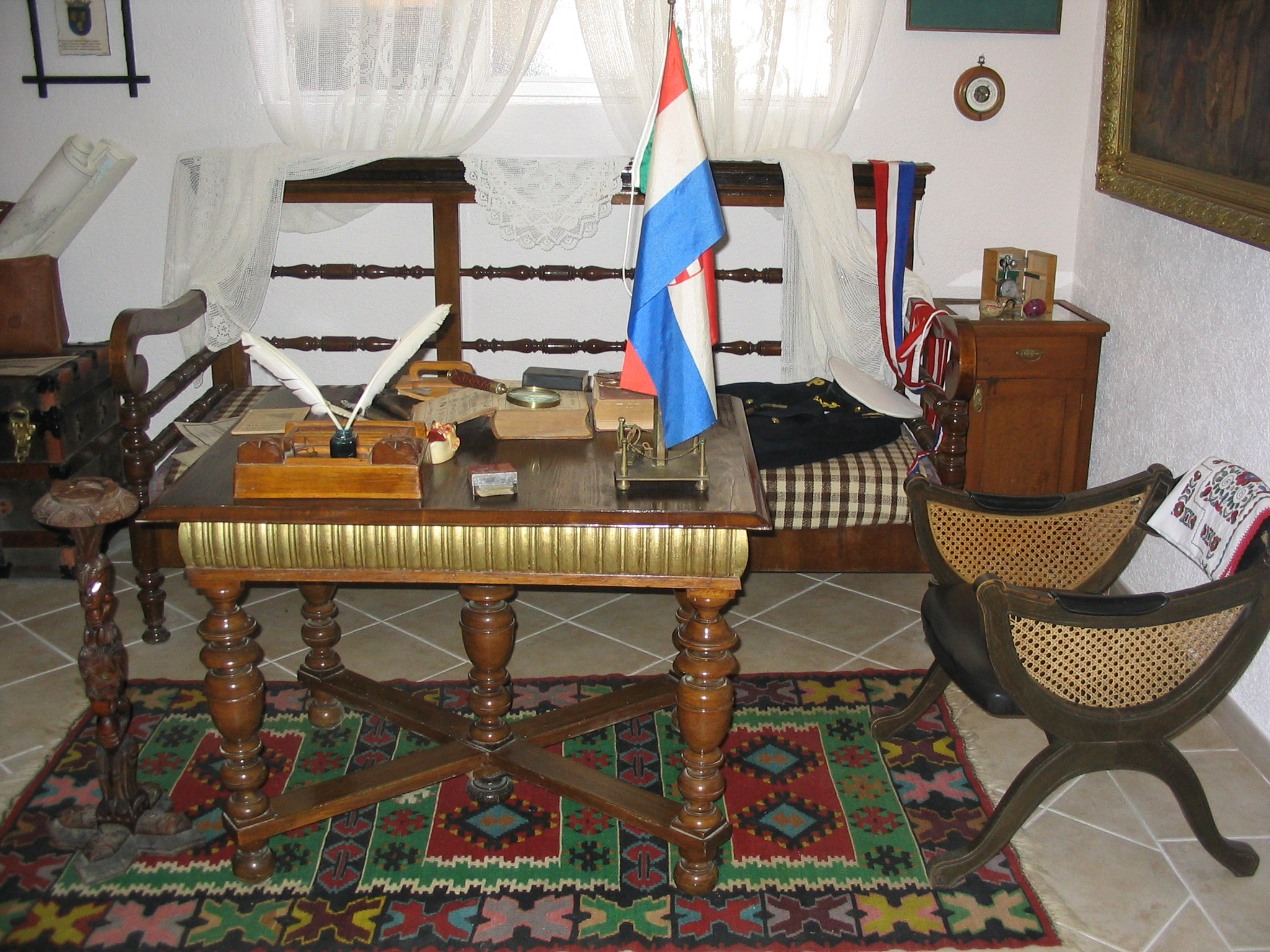 Heimatmuseum von Gradac, Arbeitszimmer eines pensionierten Kapitäns Aufgenommen von Dr. Hagen Graebner, 19.08.2006